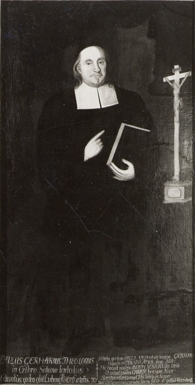 Bildnis Paul Gerhardt, Öl auf Leinwand, 2,05 × 1,05 m PAULUS GERHARDUS THEOLOGUS in Cribro Satanae tentatus et devotus postea obiit Lubenae Anno 1676, aetatis 70. Sculpta quidem PAULI, viva est ab imago GERHARDI, Cujus in ore FIDES, SPES, AMOR, usque fuit: Hic docuit nostris ASSAPH REDIVIVUS in oris Et cecinit laudes, CHRISTE benigne, tuas: Spiritus aethereis veniet Tibi sedibus hospes, Haec ubi saepe canes carmina sacra DEO. f. Gottlieb Wermdorfius D.